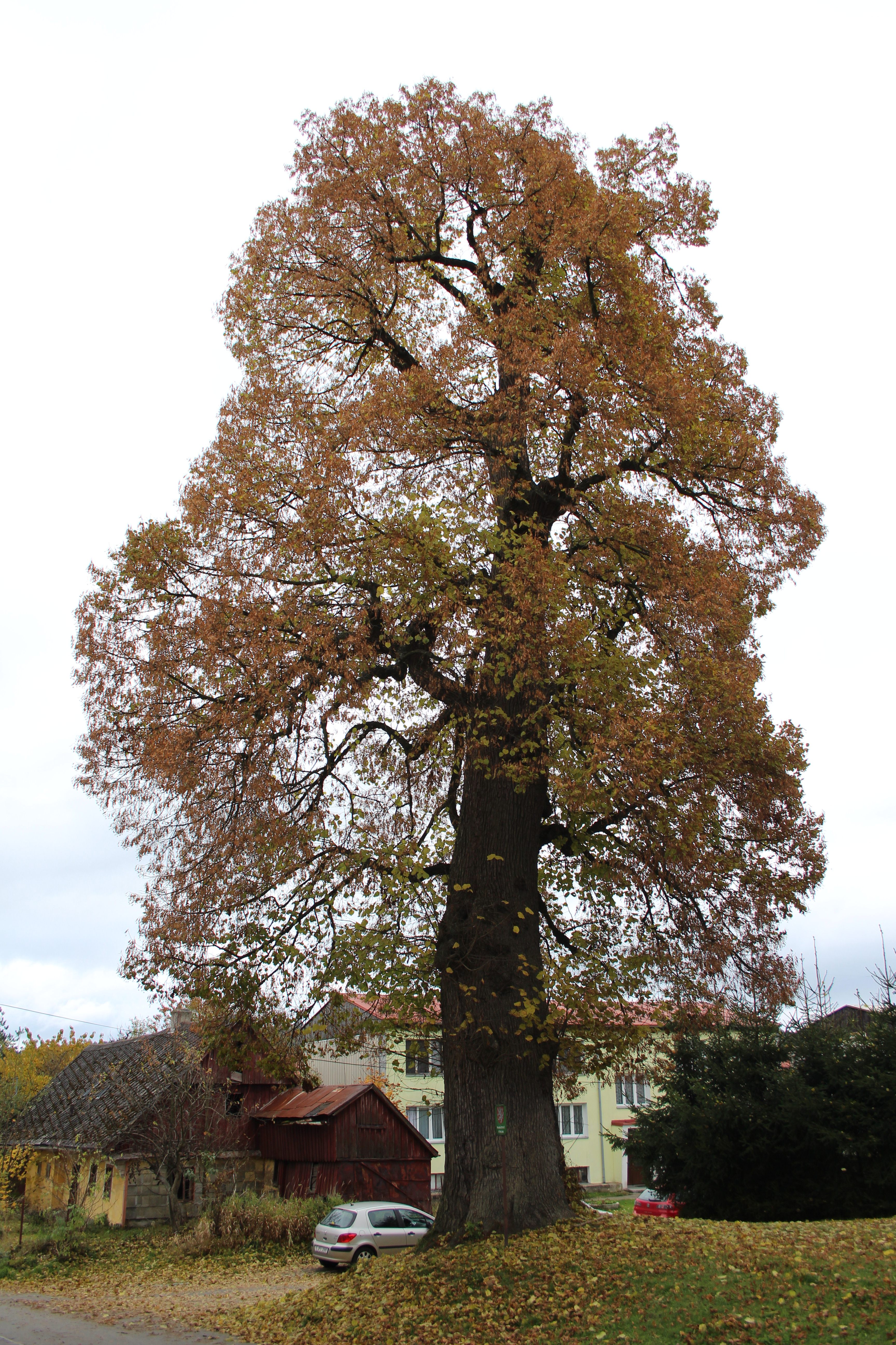 Památný strom v dolní části obce Lesná